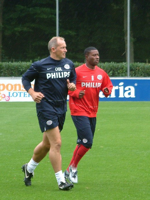 Cees van der Linden, fysiotherapeut bij PSV, samen met Edison Méndez, tijdens de training van PSV op de Herdgang, Eindhoven.